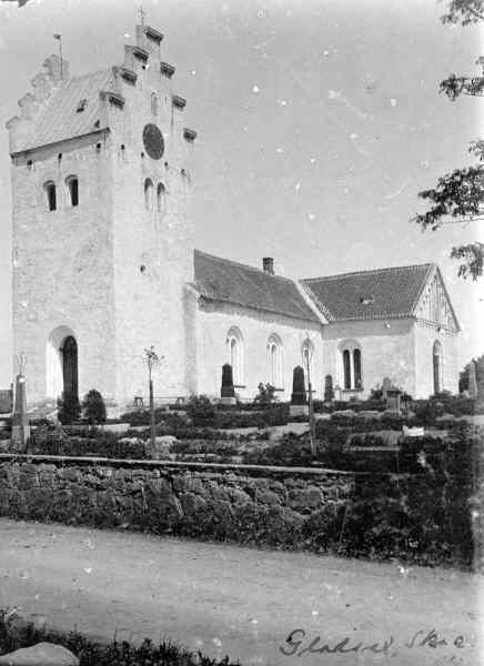 Kyrkan från sydväst.